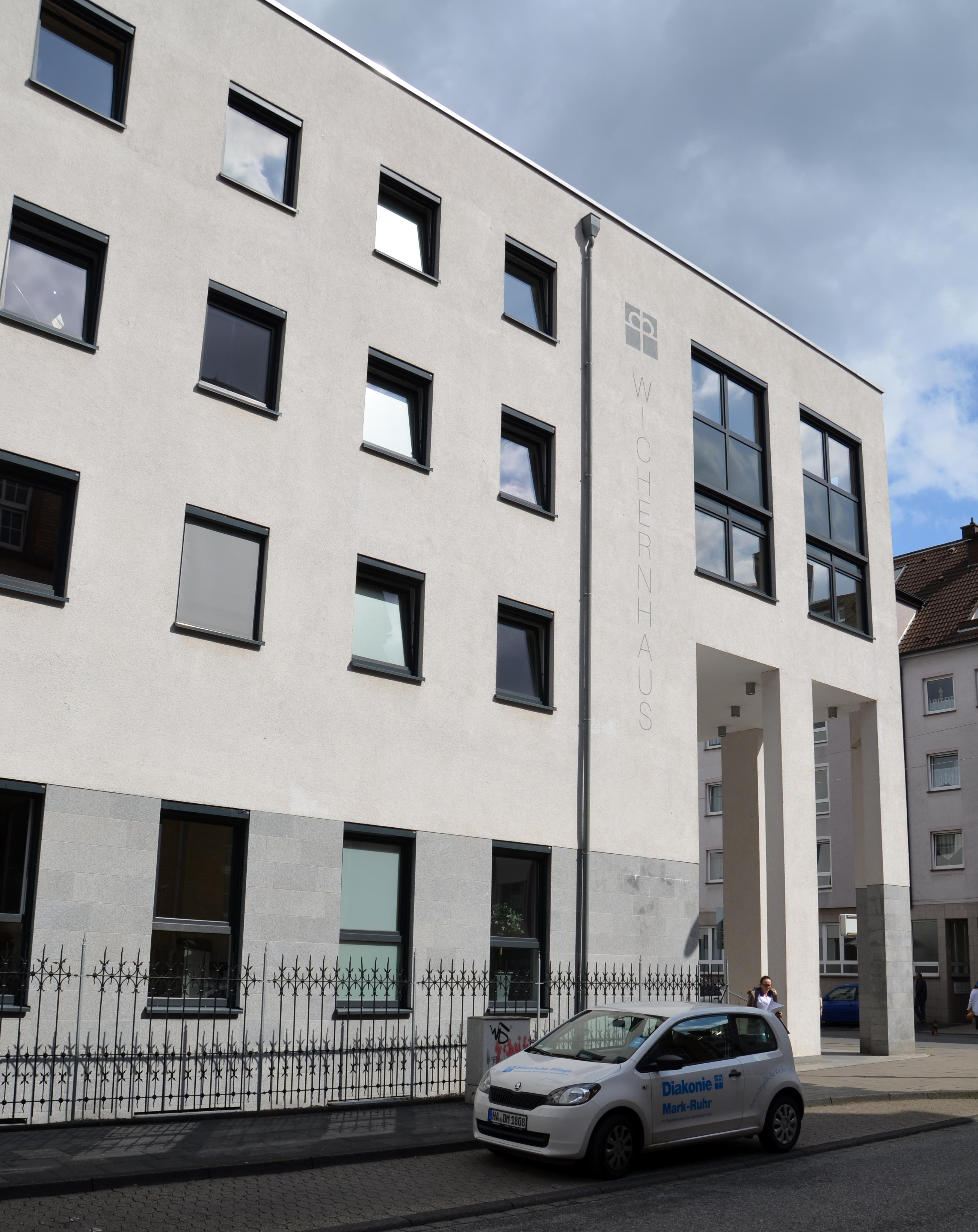 Wichernhaus Hagen - Zentrale Dienste Diakonie Mark-Ruhr